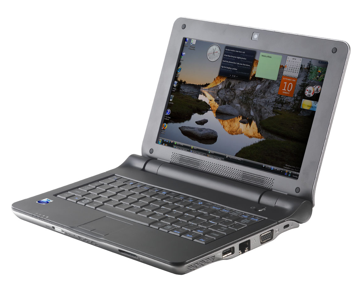 VIA OpenBook (Top View, Close-Up)